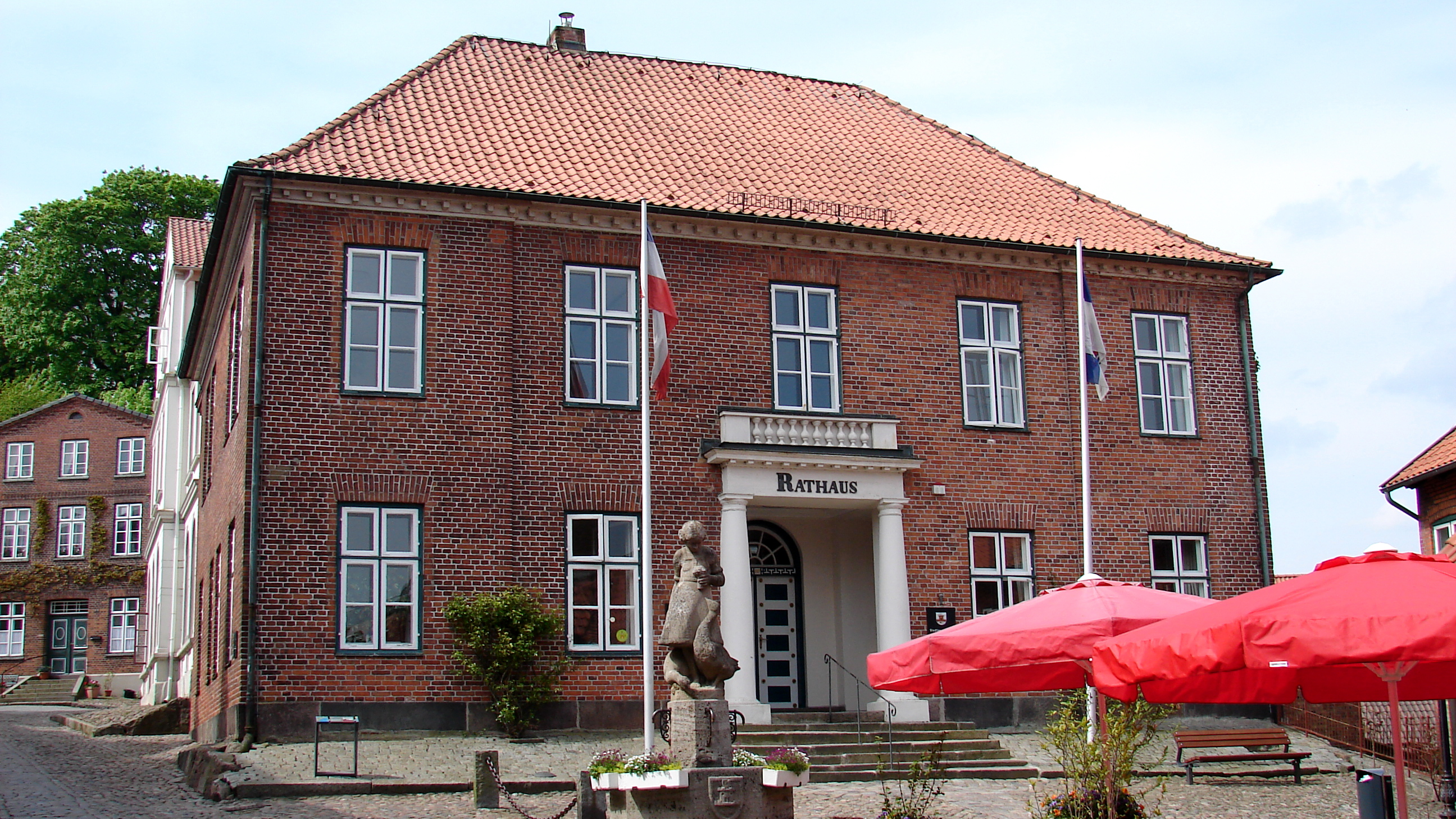 Das Plöner Rathaus wurde 1816 - 1818 am alten Marktplatz erbaut.